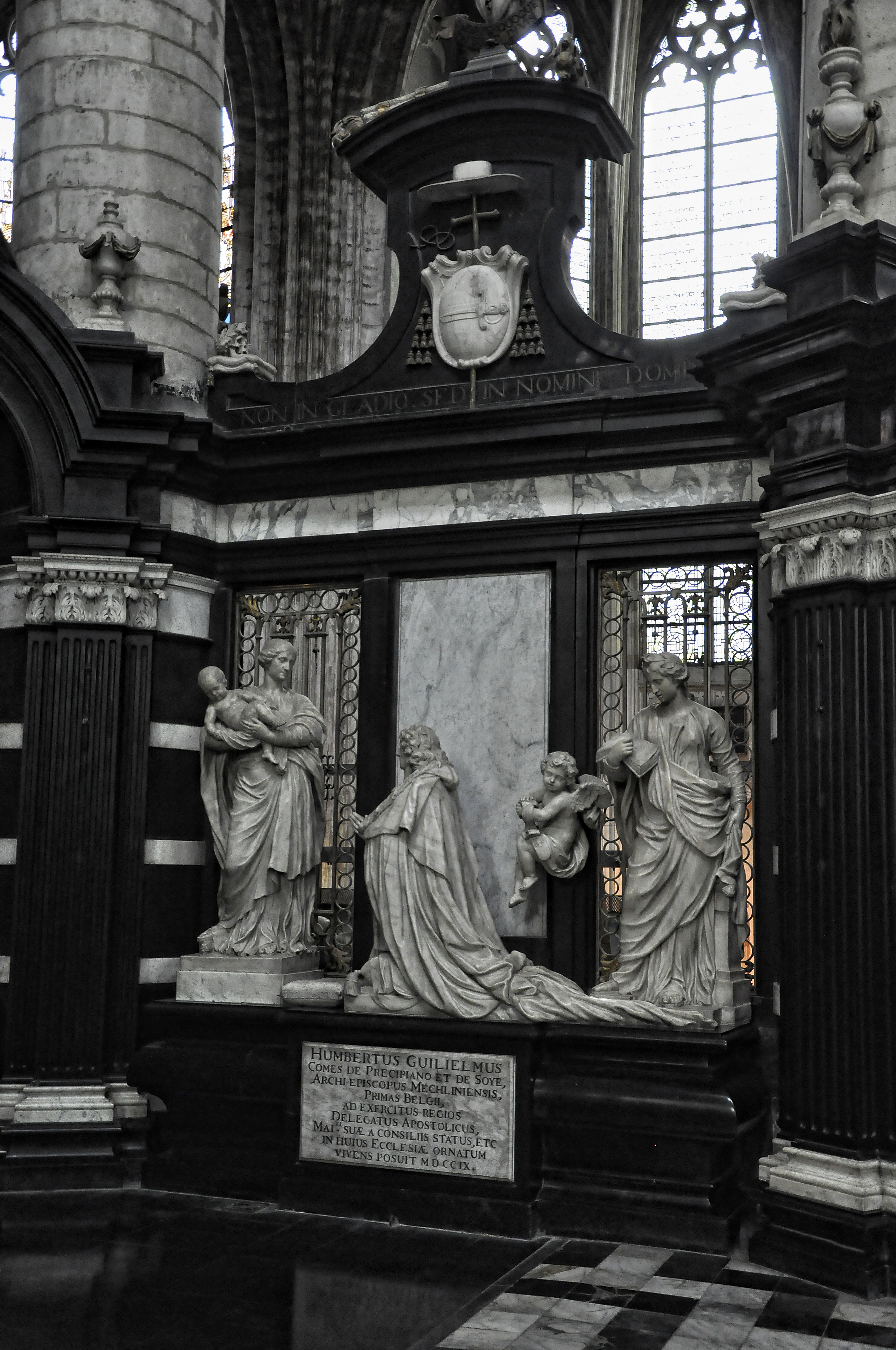 Het grafmonument van Humbert-Guillaume de Precipiano, aartsbisschop van Mechelen in de Sint-Romboutskathedraal, ontwerp van Michiel van der Voort